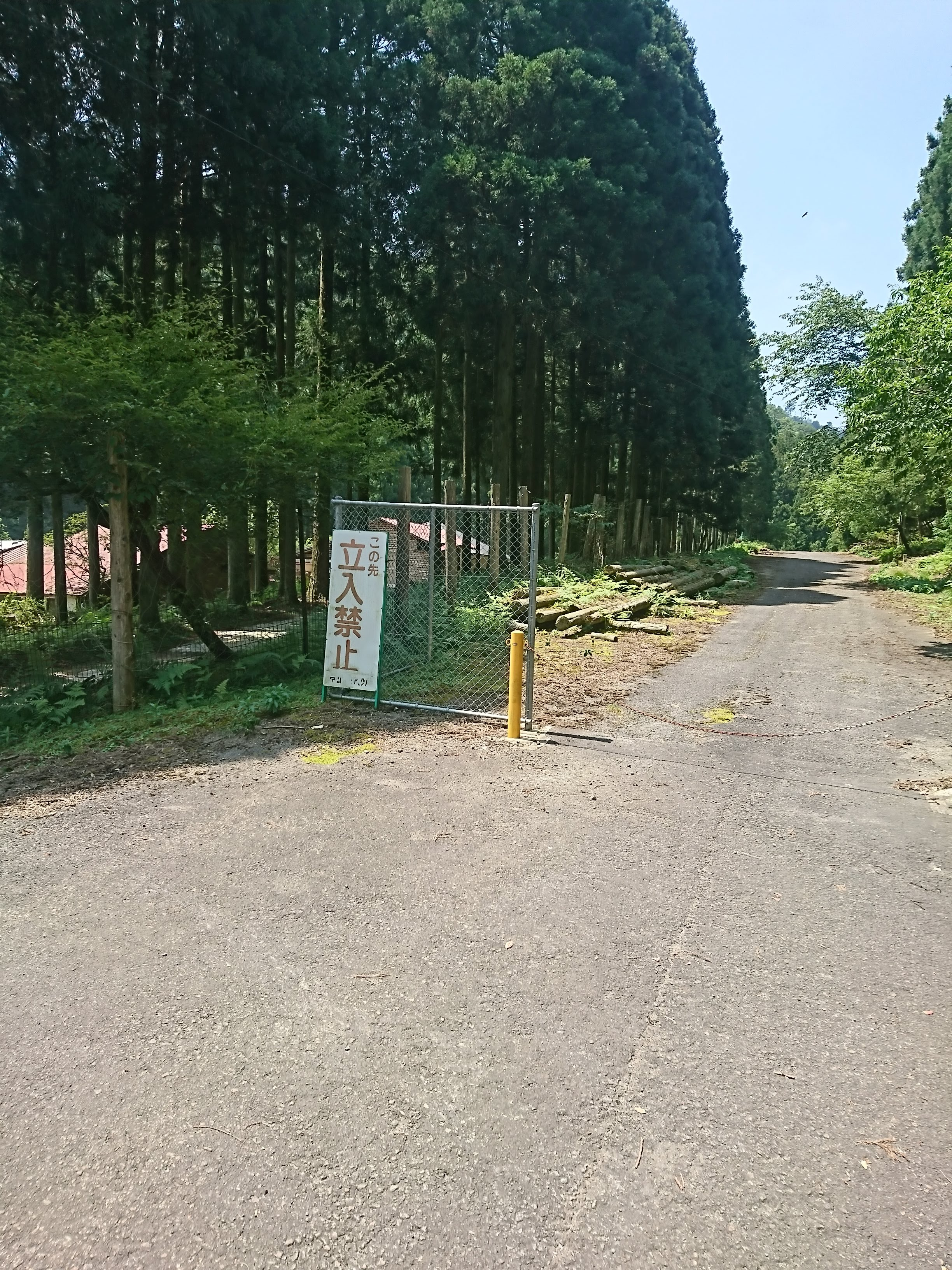 ヒノコ付近の大原花背線の施工済の路盤。チェーンがかかって封鎖されている。